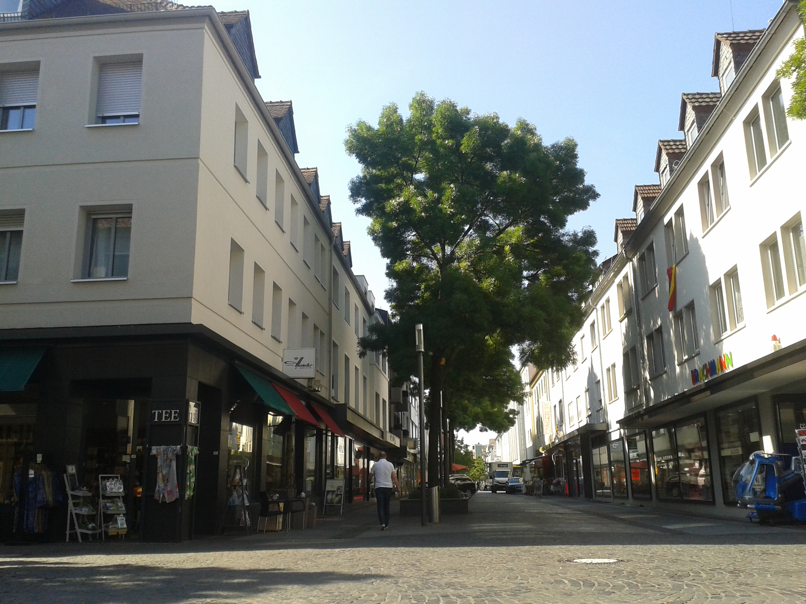 Rosenstraße